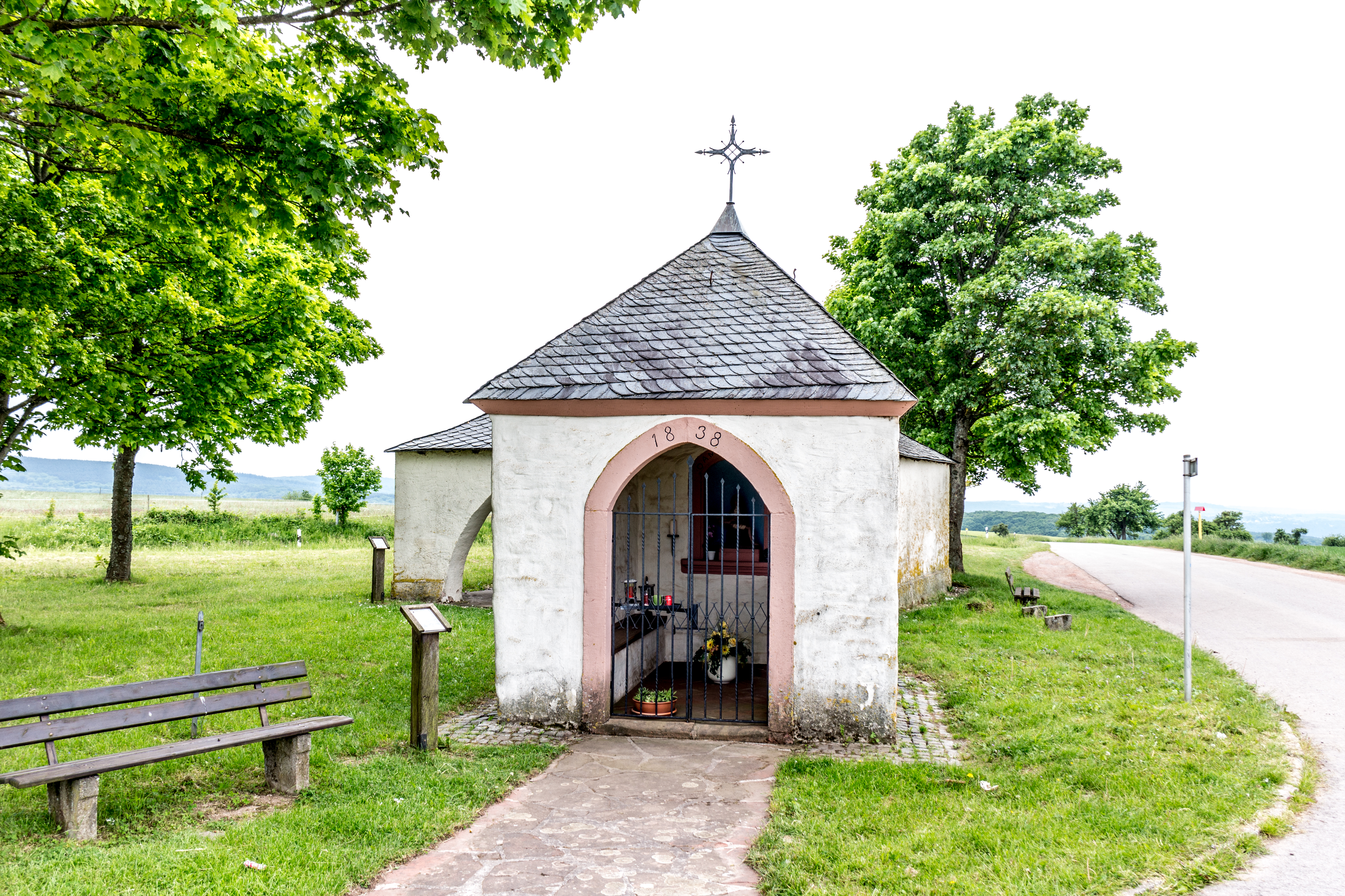 Speiner Bildchen bei Irsch imde:Naturpark Saar-Hunsrück